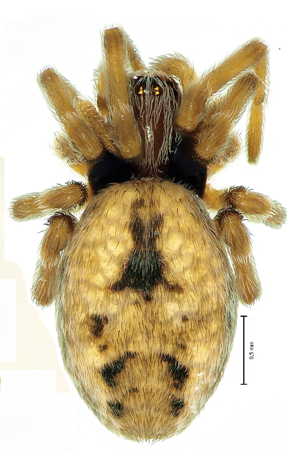 Dictyna palmgreni female